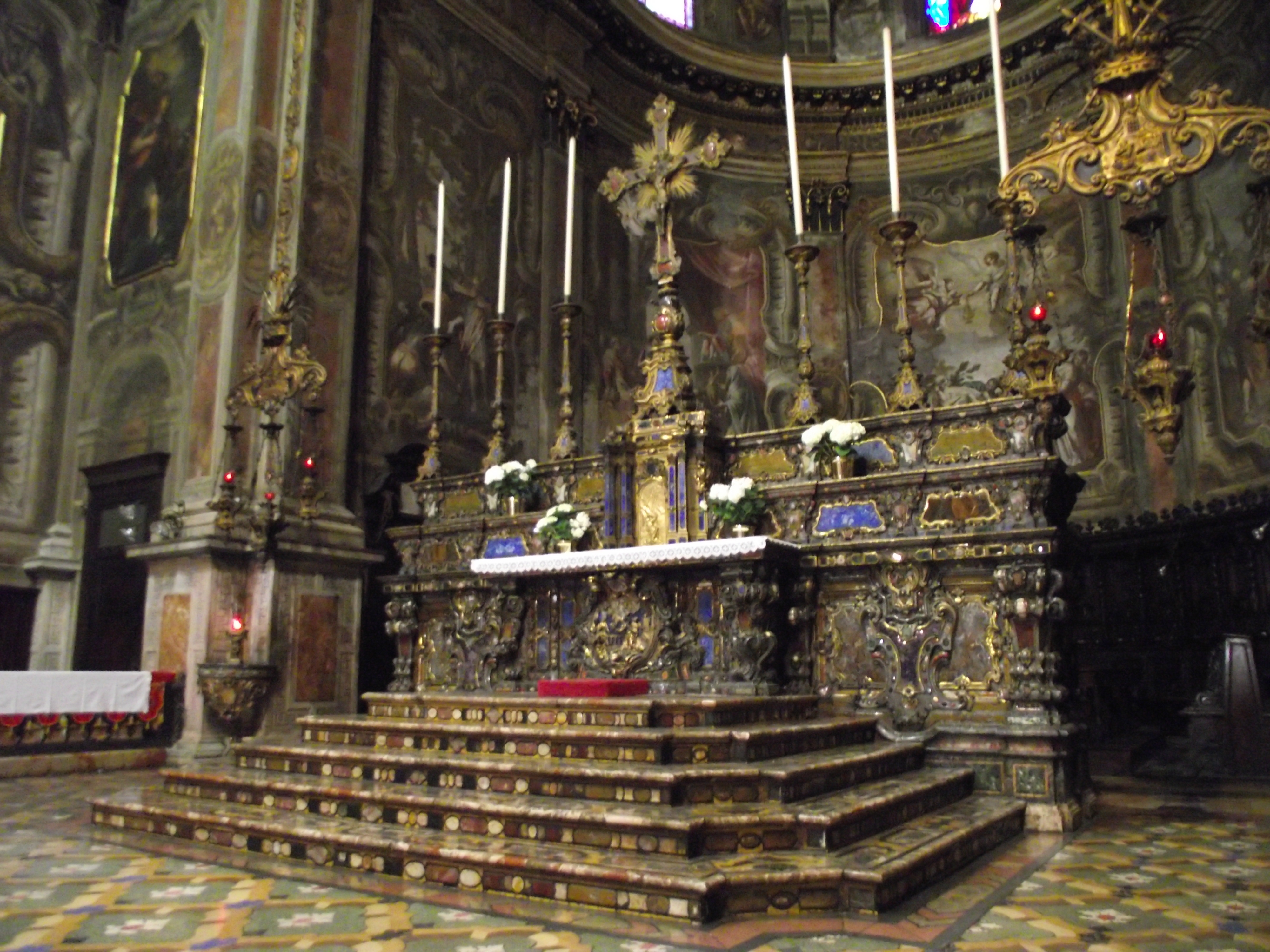 L'altar maggiore opera Giovanni Battista Riccardi detto il Donnino, del quarto decennio del Settecento